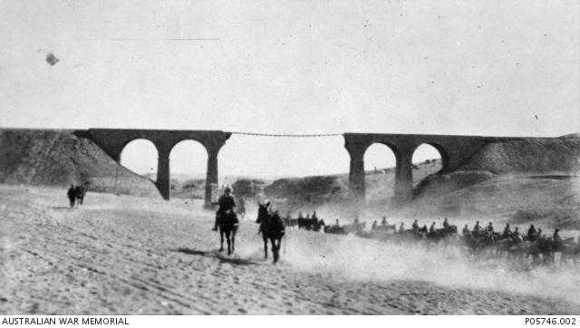 הגשר ההרוס ליד תל אל-שריעה. הגשר נהרס על ידי הטורקים ותוקן על ידי הבריטים